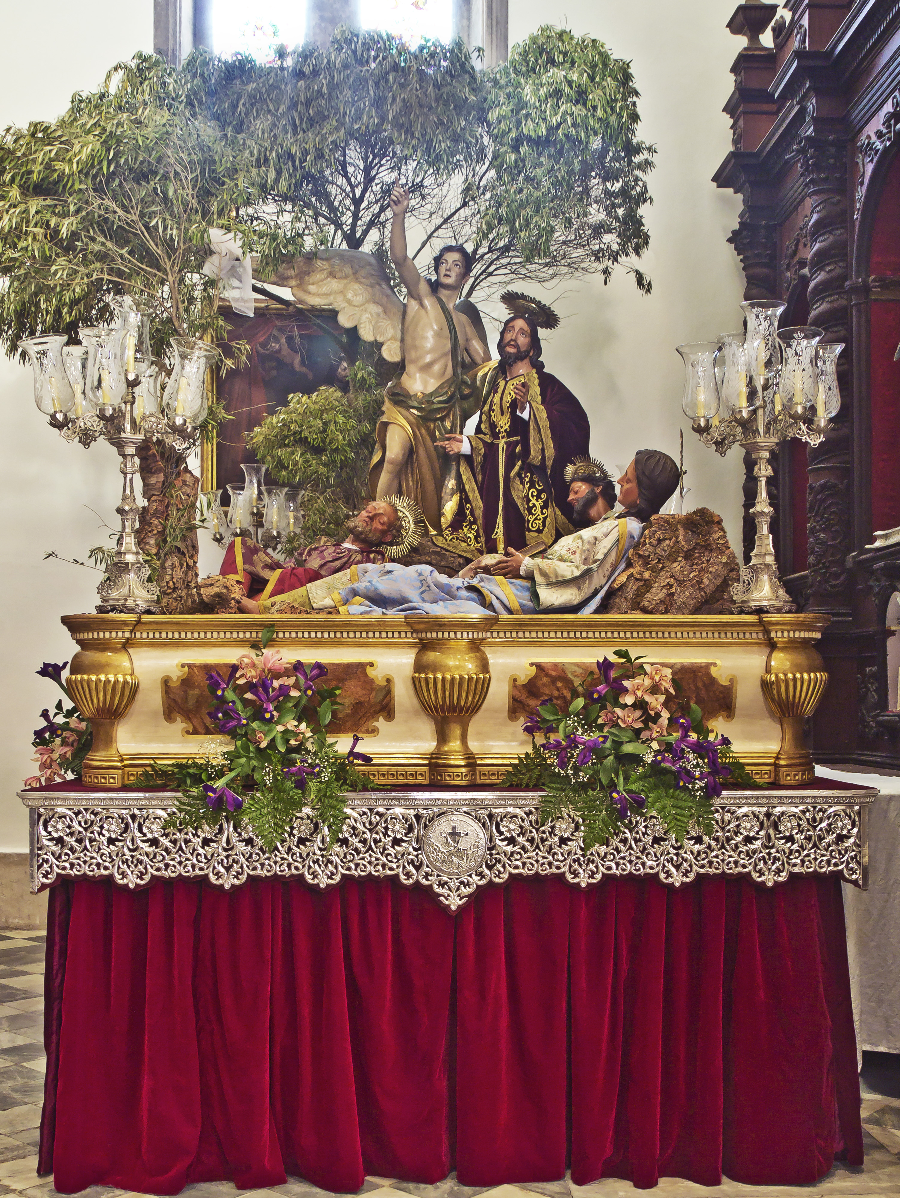 Paso del Señor en el huerto de los olivos